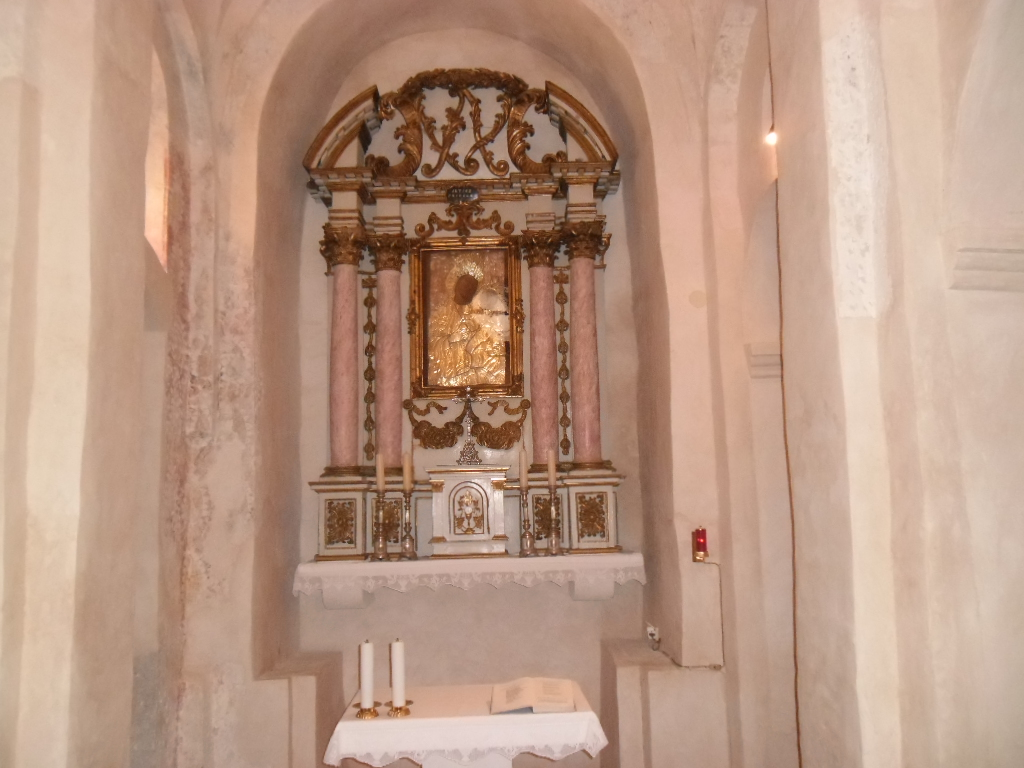 kapela dubrovačkog samostana Sigurata